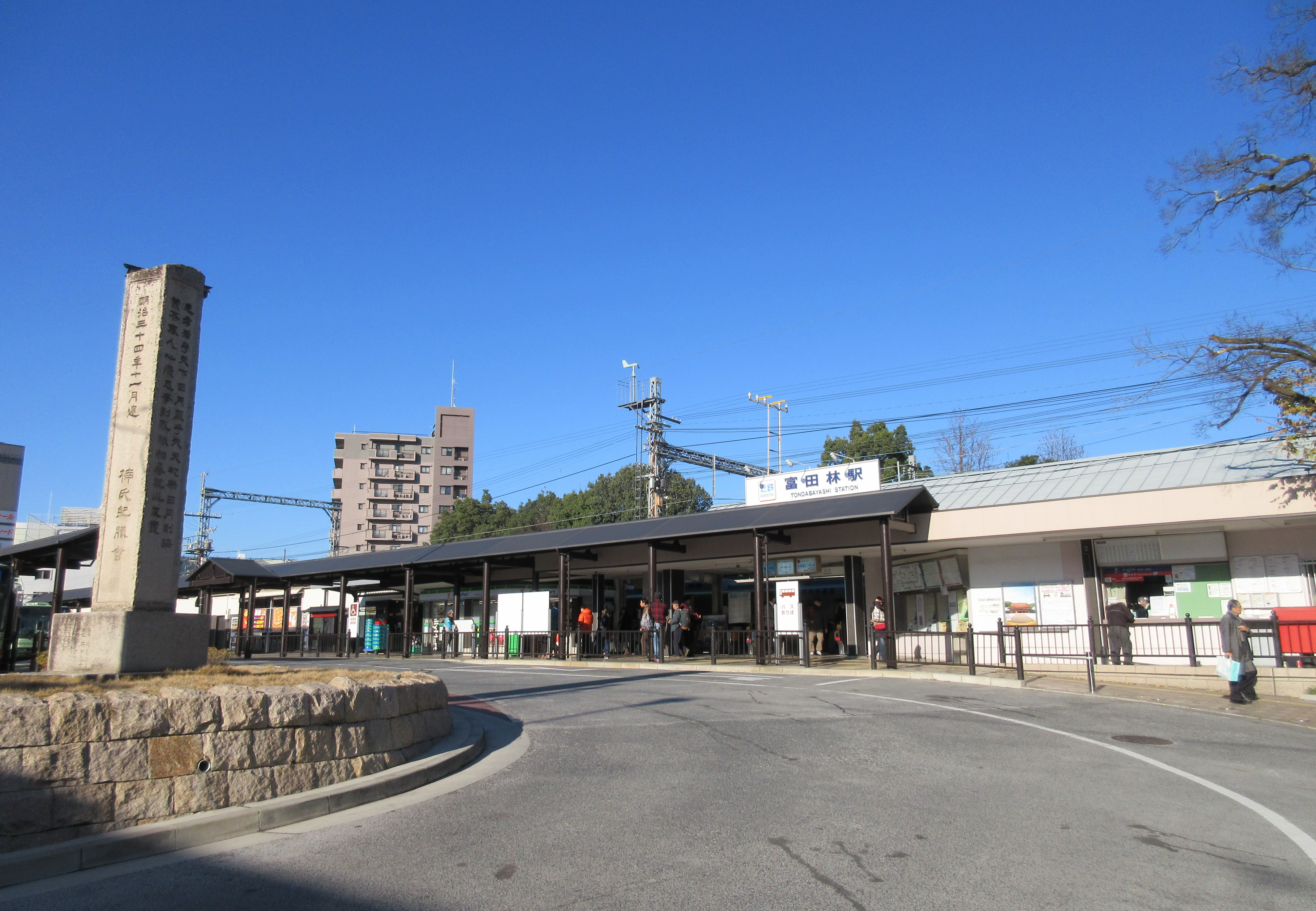 近鉄富田林駅